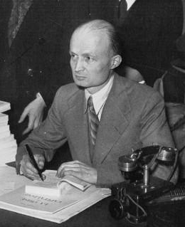 Joseph Peyré (1892-1968) signant son roman Sang et Lumières.